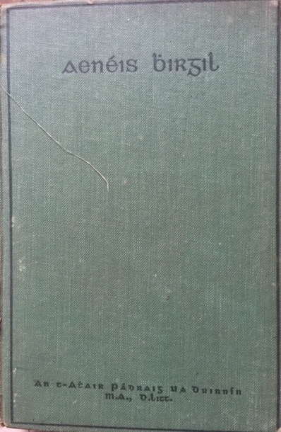 Lasar scan of book cover